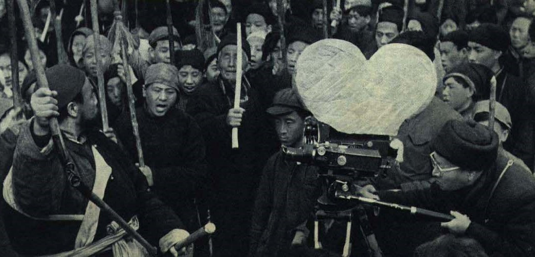 1962-07 1962年最右为百花奖最佳摄影吴印咸在拍摄《红旗谱》